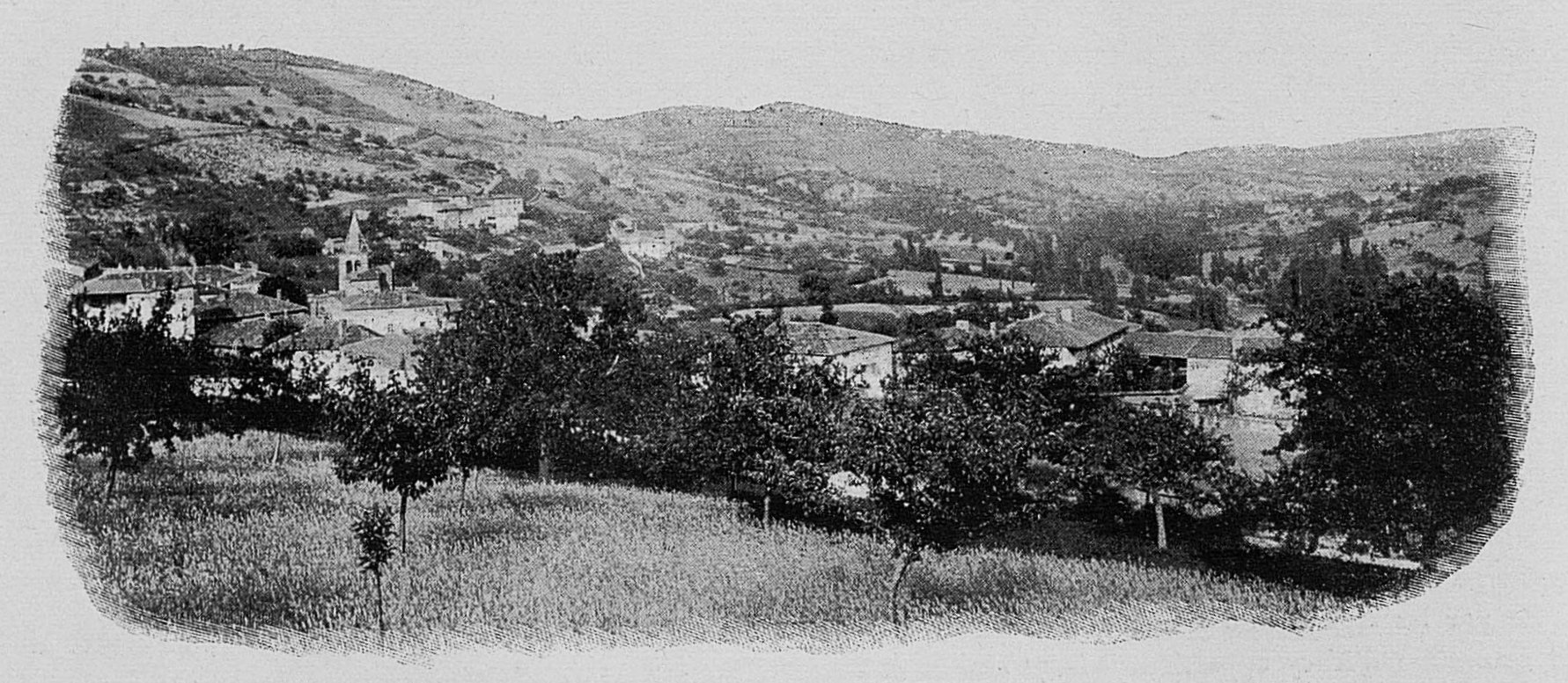 Dictionnaire illustré des communes du département du Rhône. Tome 1 / par MM. E. de Rolland et D. Clouzet.